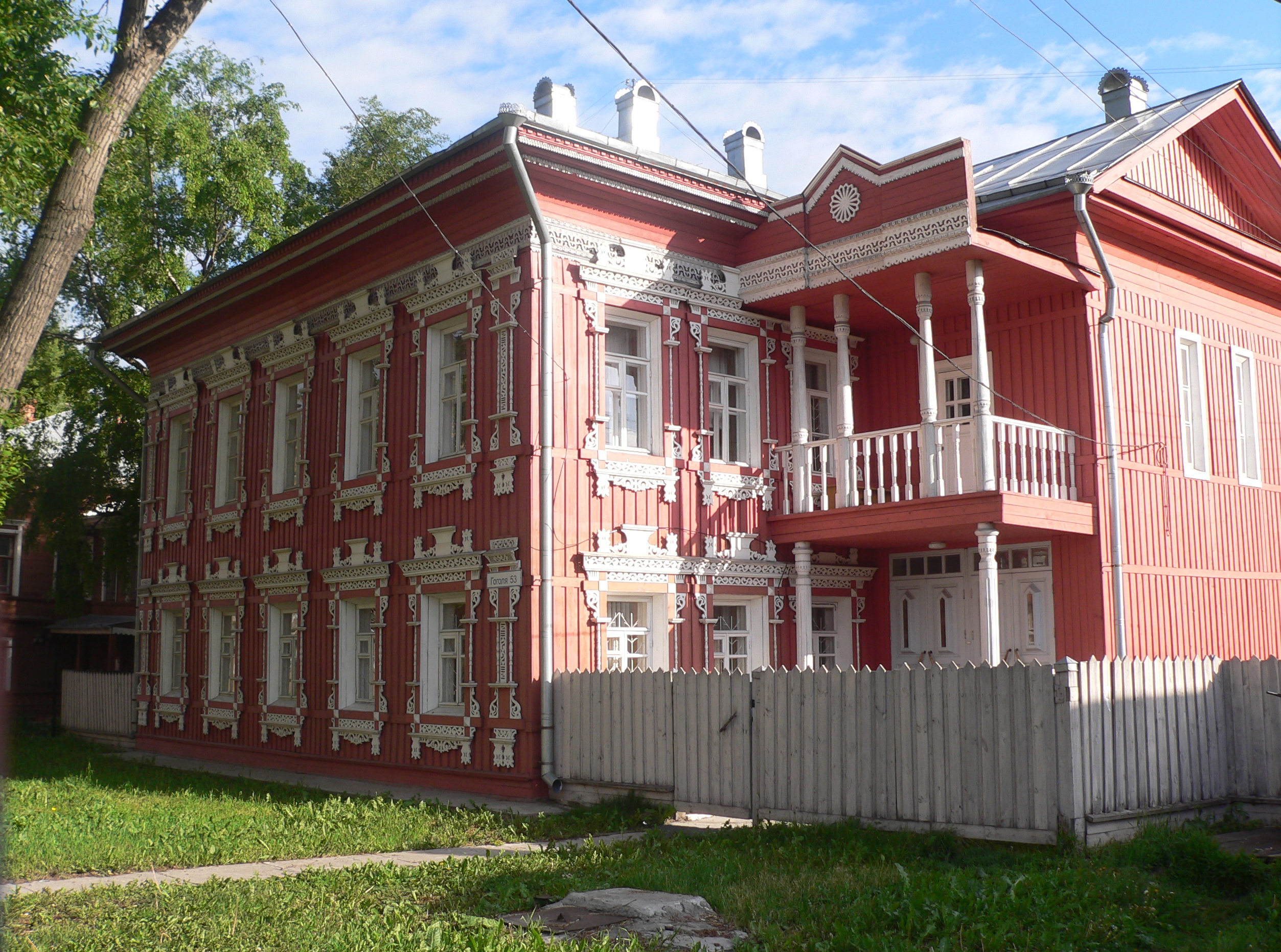 Отреставрированный деревянный дом в Вологде